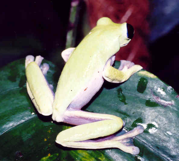 Agalychnis litodryas